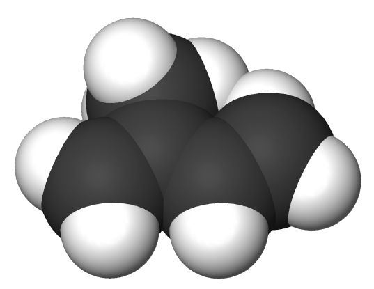 Isoprene